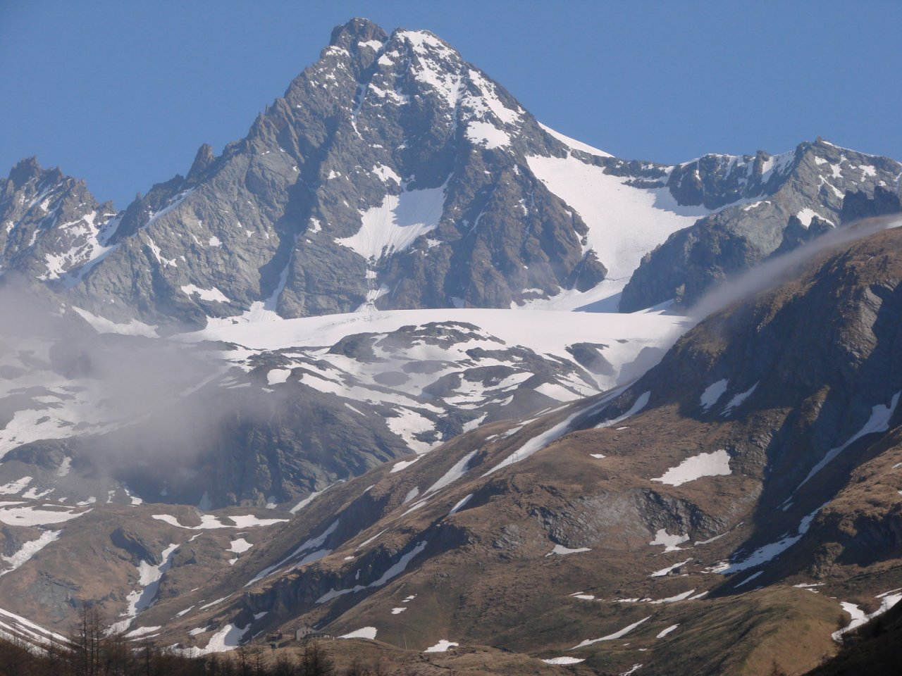 Grossglockner, photo by Tomasz Muszer